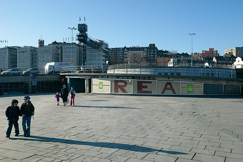 Motiv: Slussen Nyckelord: Riksintressen Kategori: Stadsmiljö Slussen